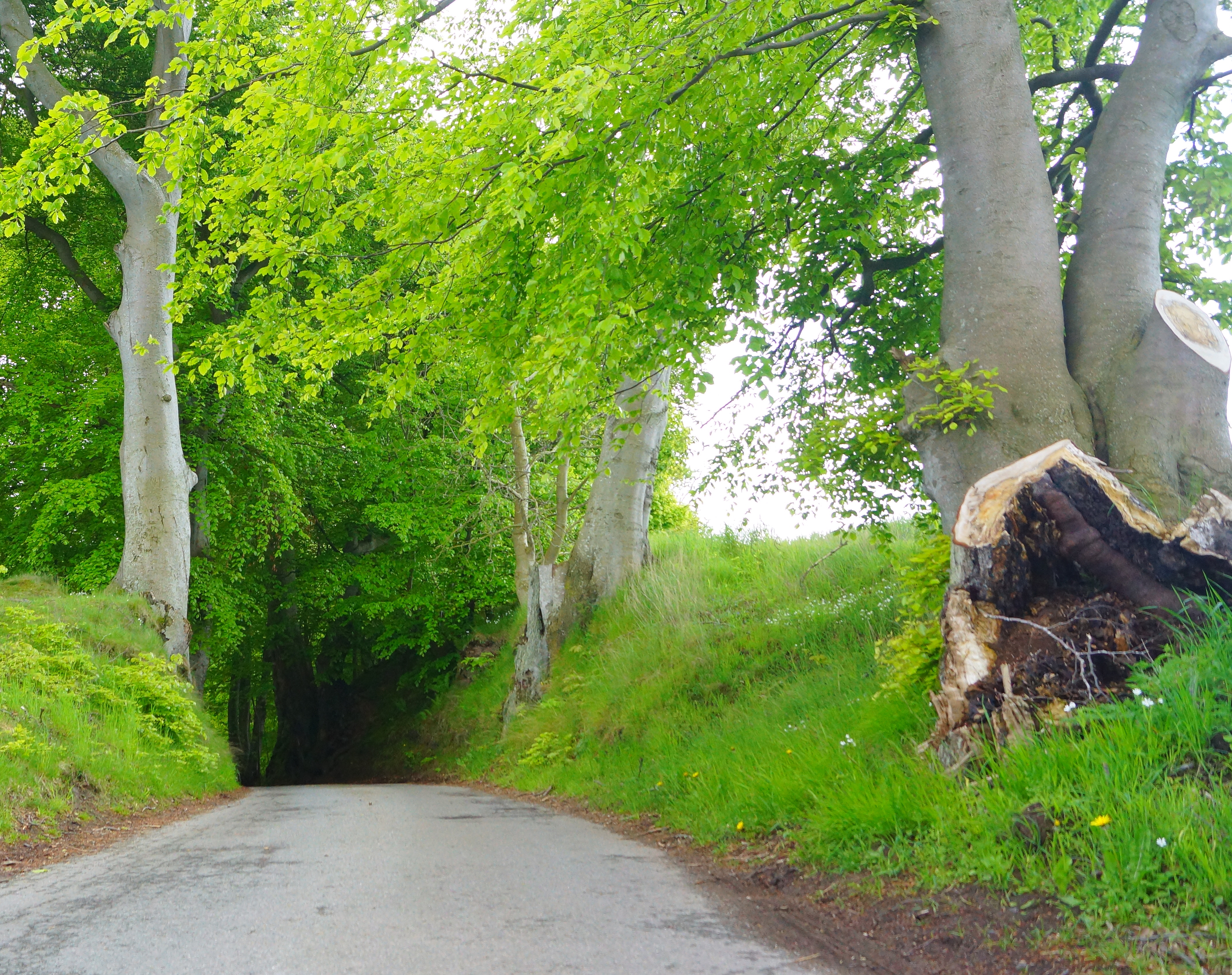 Katholm slot, Hulvejen